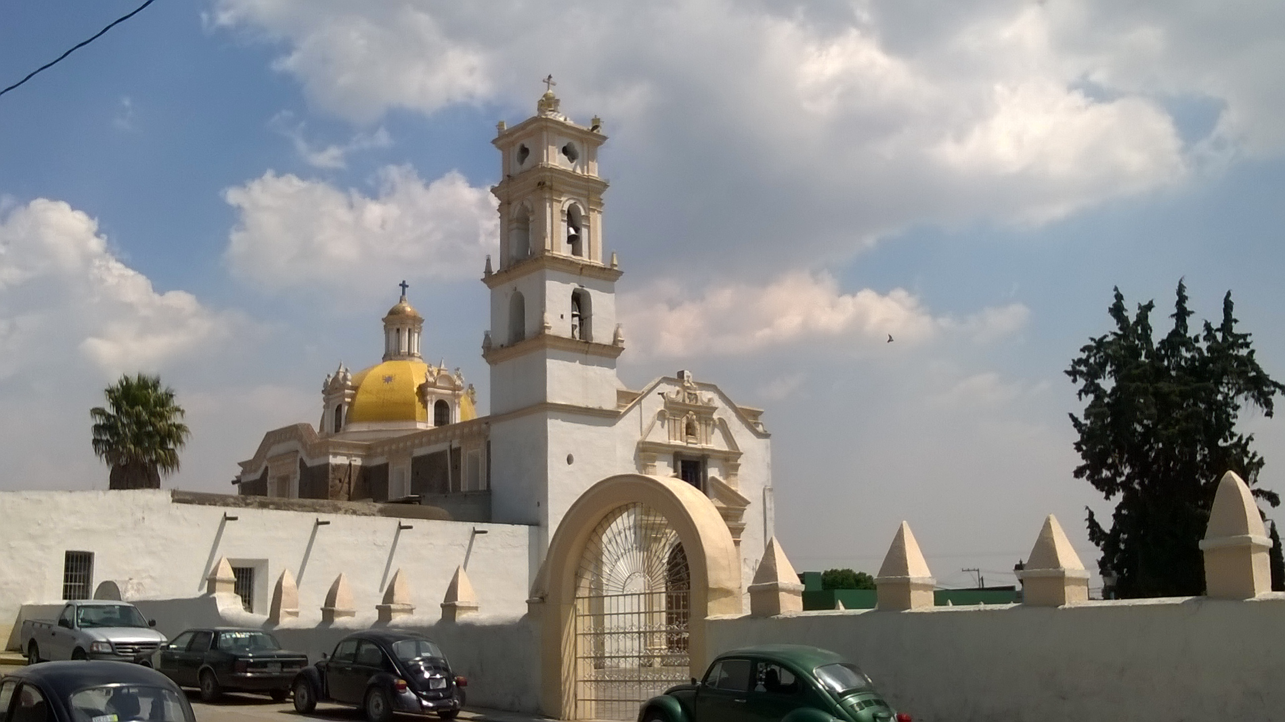 Parroquia de Santa Isabel, Xiloxoxtla, Tlaxcala